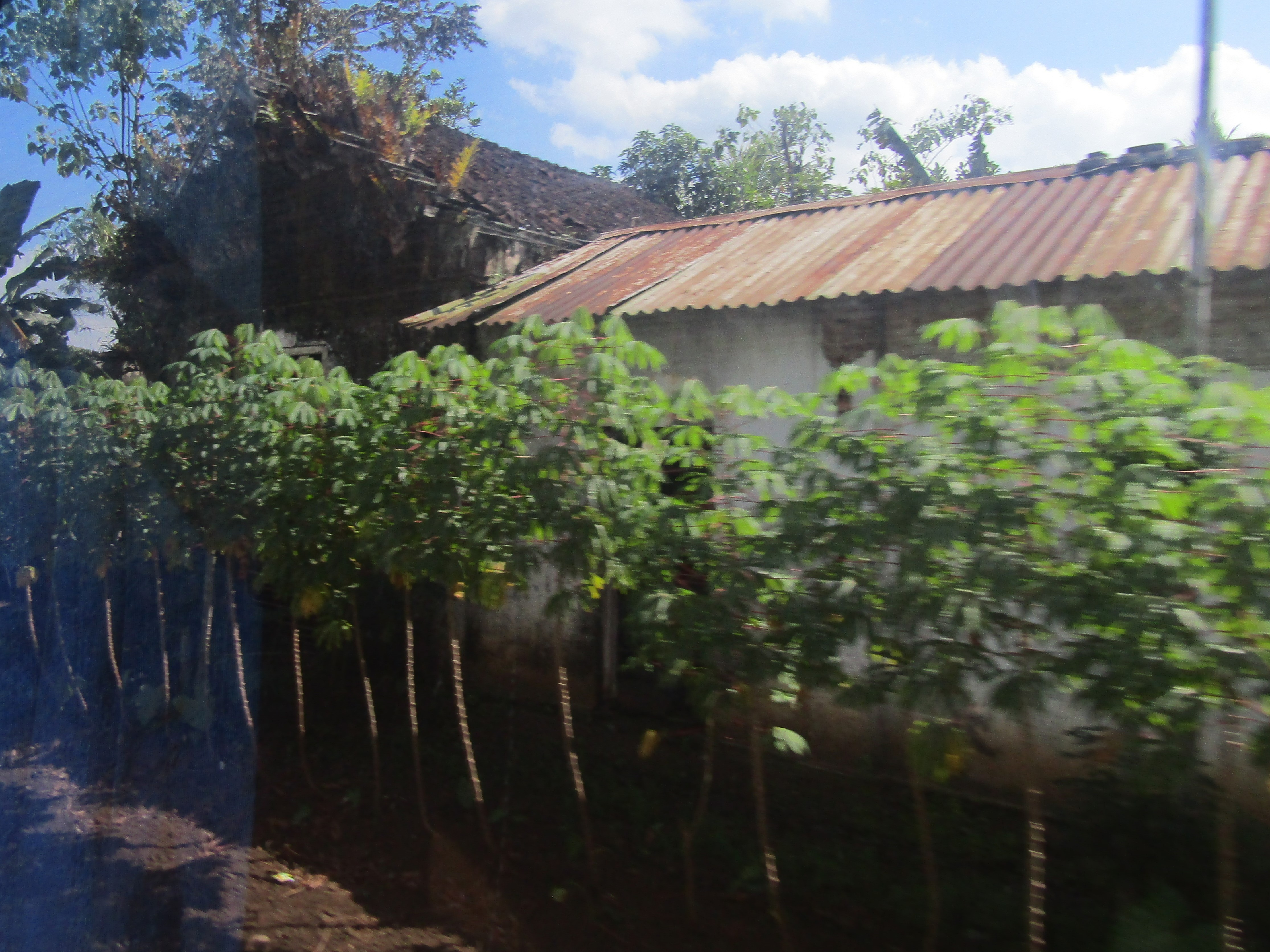 Stasiun nonaktif Sumberbaru, terletak di Desa Yosorati, Kecamatan Sumberbaru, Kabupaten Jember.